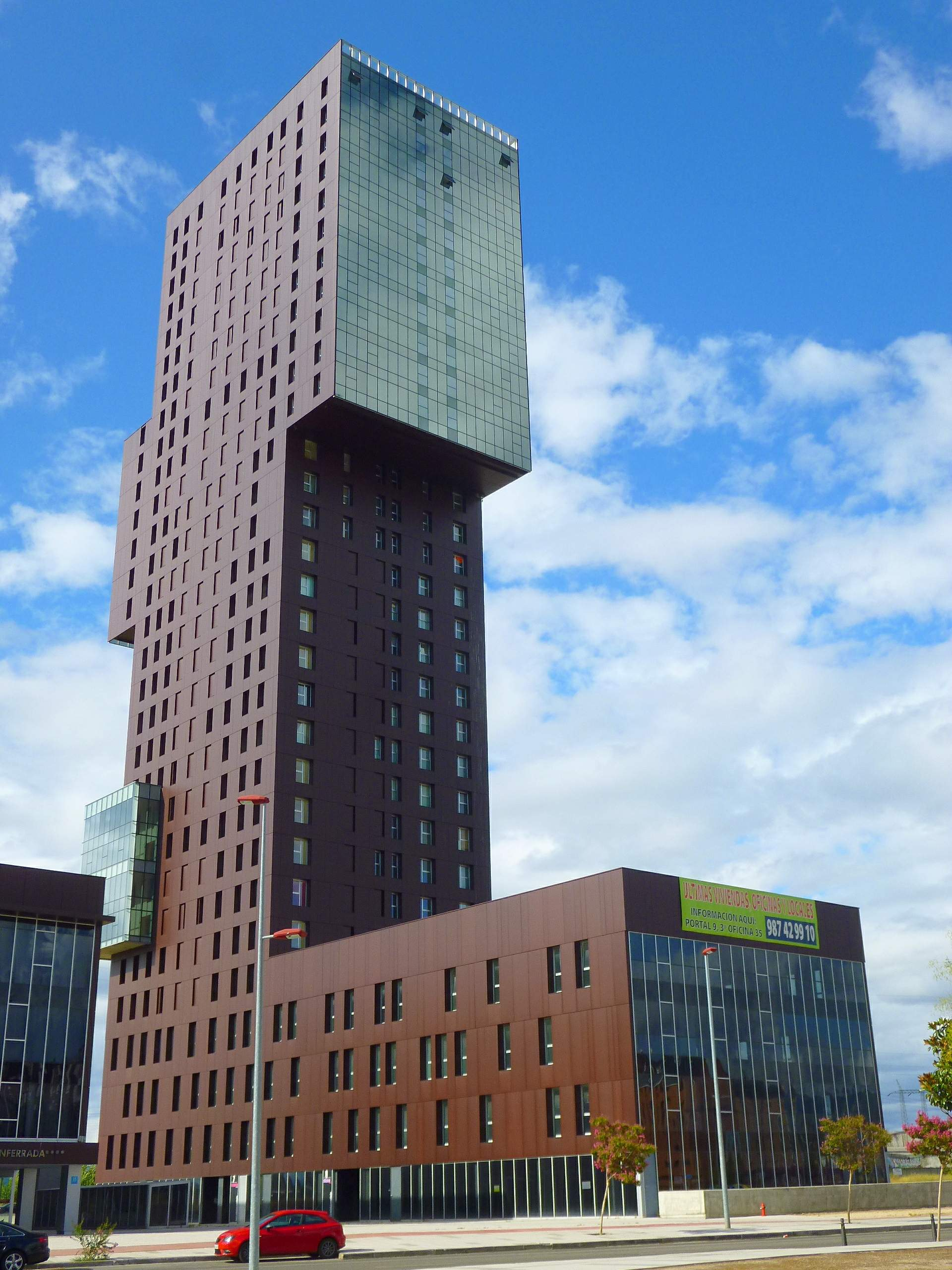 Torre de la Rosaleda (Ponferrada)